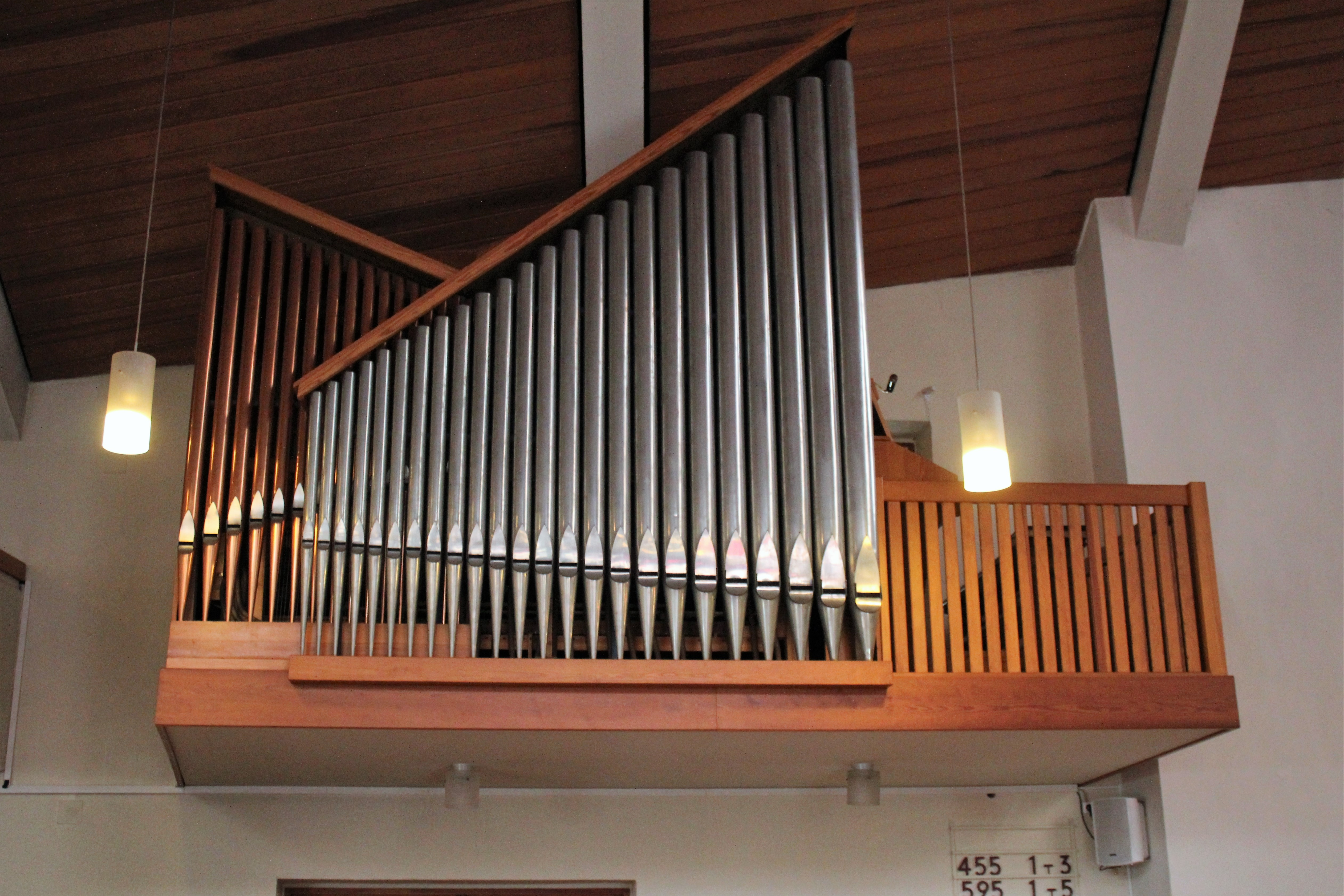 Evangelische Kirche Katzenfurt, Lahn-Dill-Kreis, Hessen, Deutschland